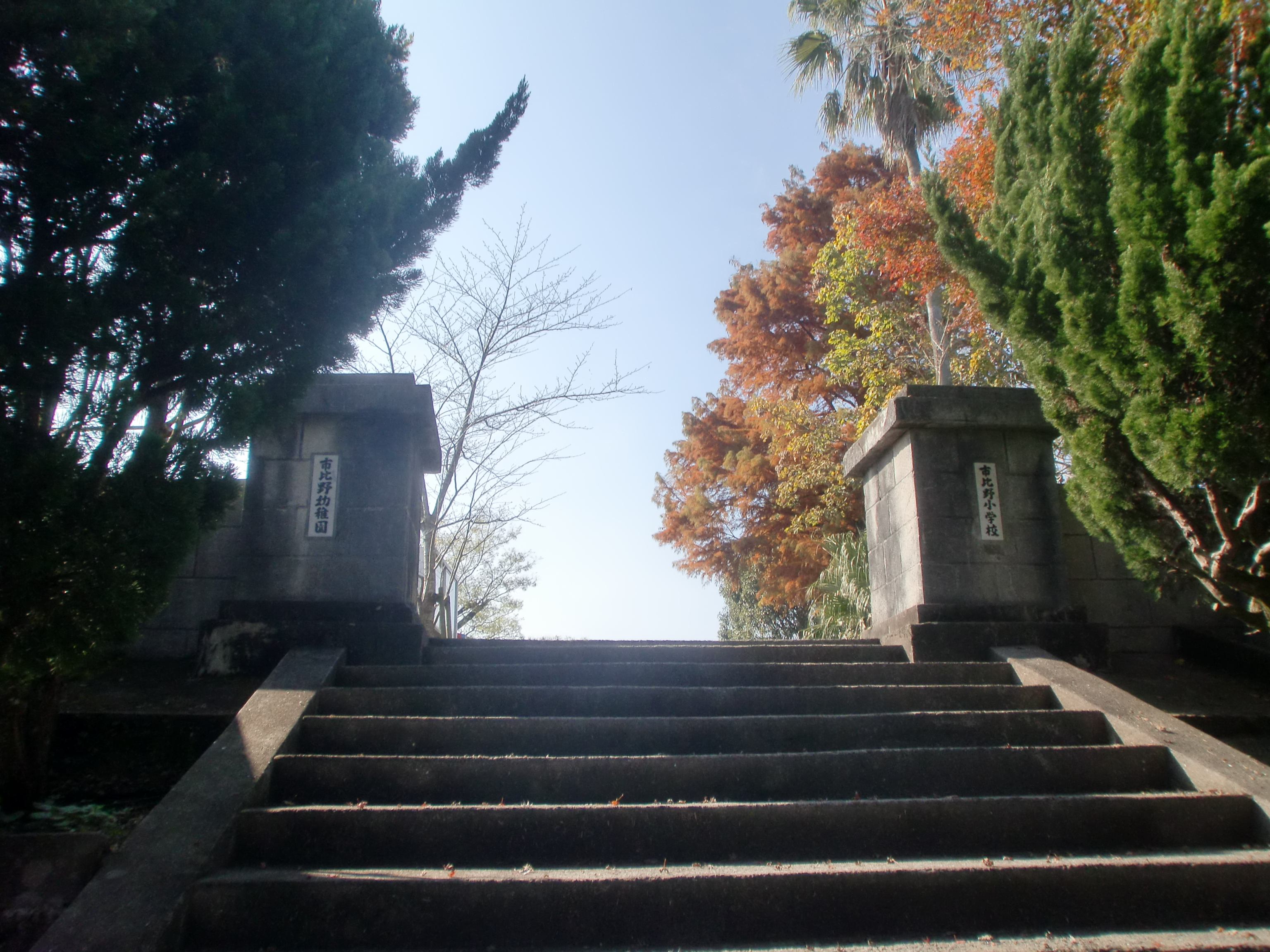 薩摩川内市立市比野小学校の校門。